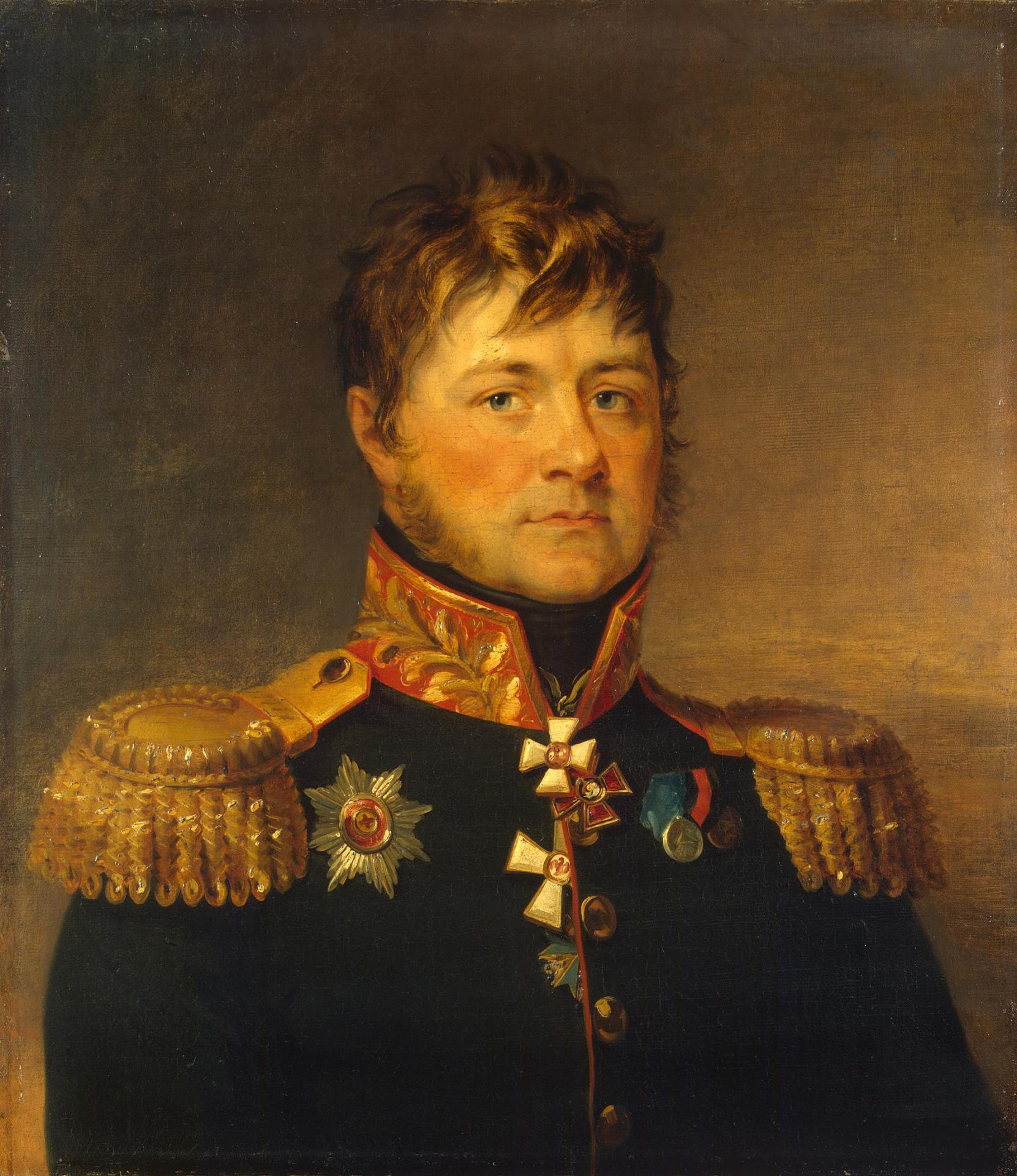 Ivan Lavrentyevich Pol' (1768 – 19.04.1840) russian general